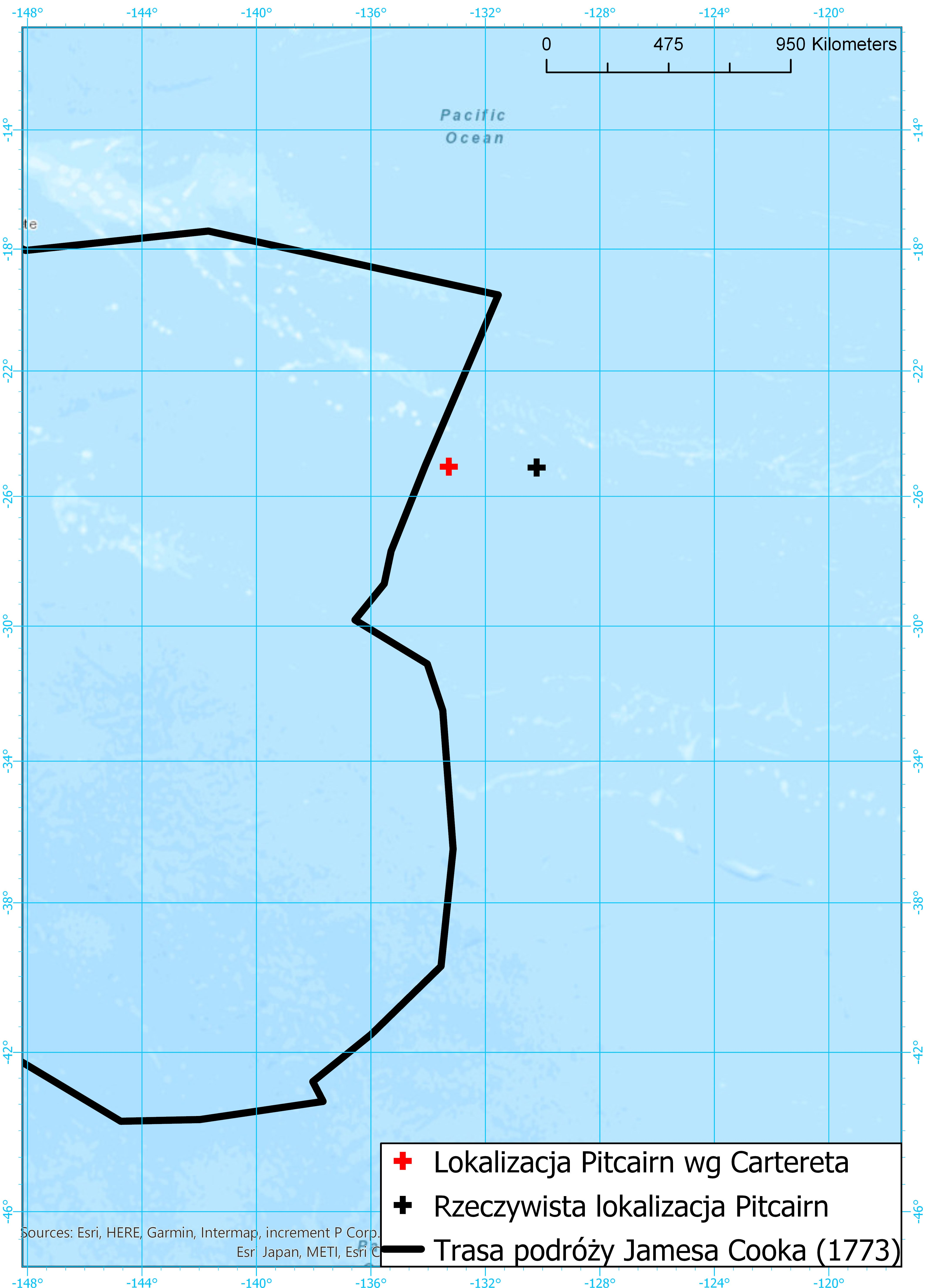 Fragment trasy podróży Jamesa Cooka w roku 1773 wraz z oznaczoną pozycją wyspy Pitcairn. Wyspę odkrył w 1767 roku Philip Carteret, lecz błędnie ustalił jej współrzędne. Z tego powodu podczas swojej wyprawy James Cook nie był w stanie jej zlokalizować.